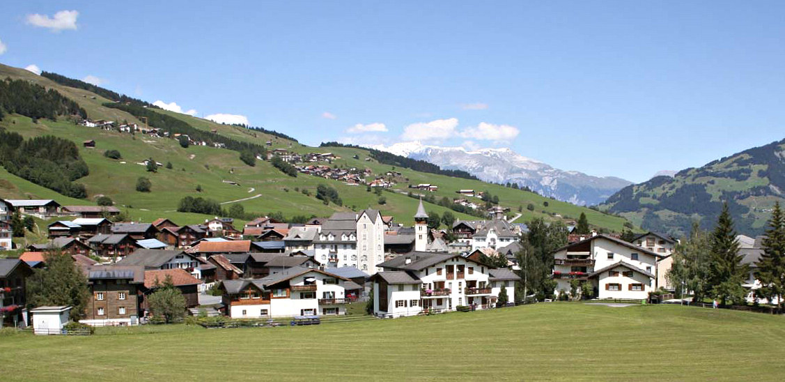 Vella